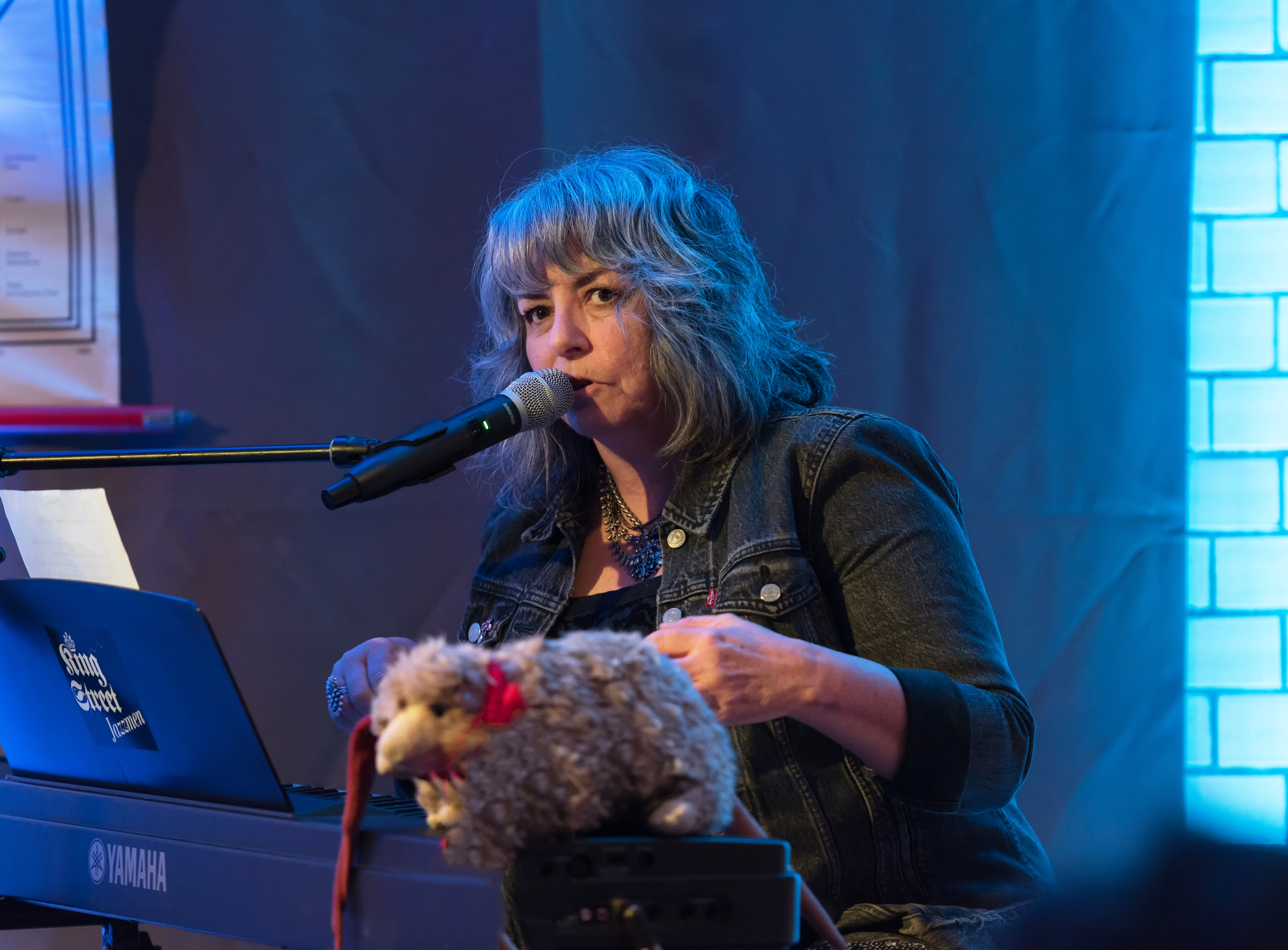 Lynn Miles bei Lottes Musiknacht im Industriemuseum Elmshorn 2018